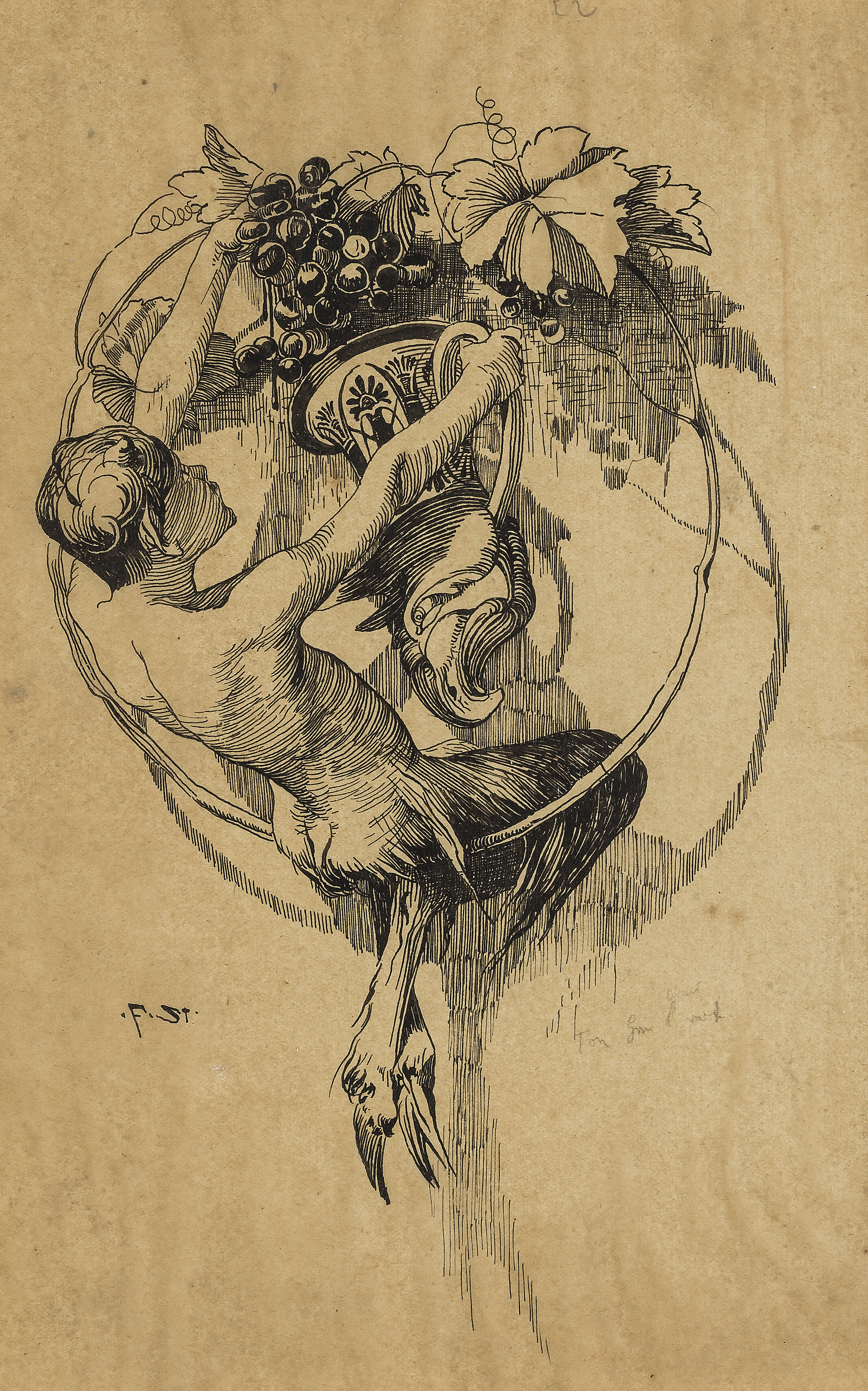 Franz von Stuck: Faun mit Rhyton. Tusche in Feder auf Pergamentpapier, 22,5 x 15 cm, rechts unten monogrammiert „.F.St.“, rechts unten in Bleistift bezeichnet „Ton Grau & rot“.